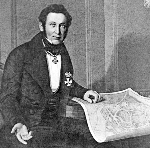 August Wilhelm Francke, Oberbürgermeister von Magdeburg, zeitgen. Darstellung des 1851 Verstorbenen